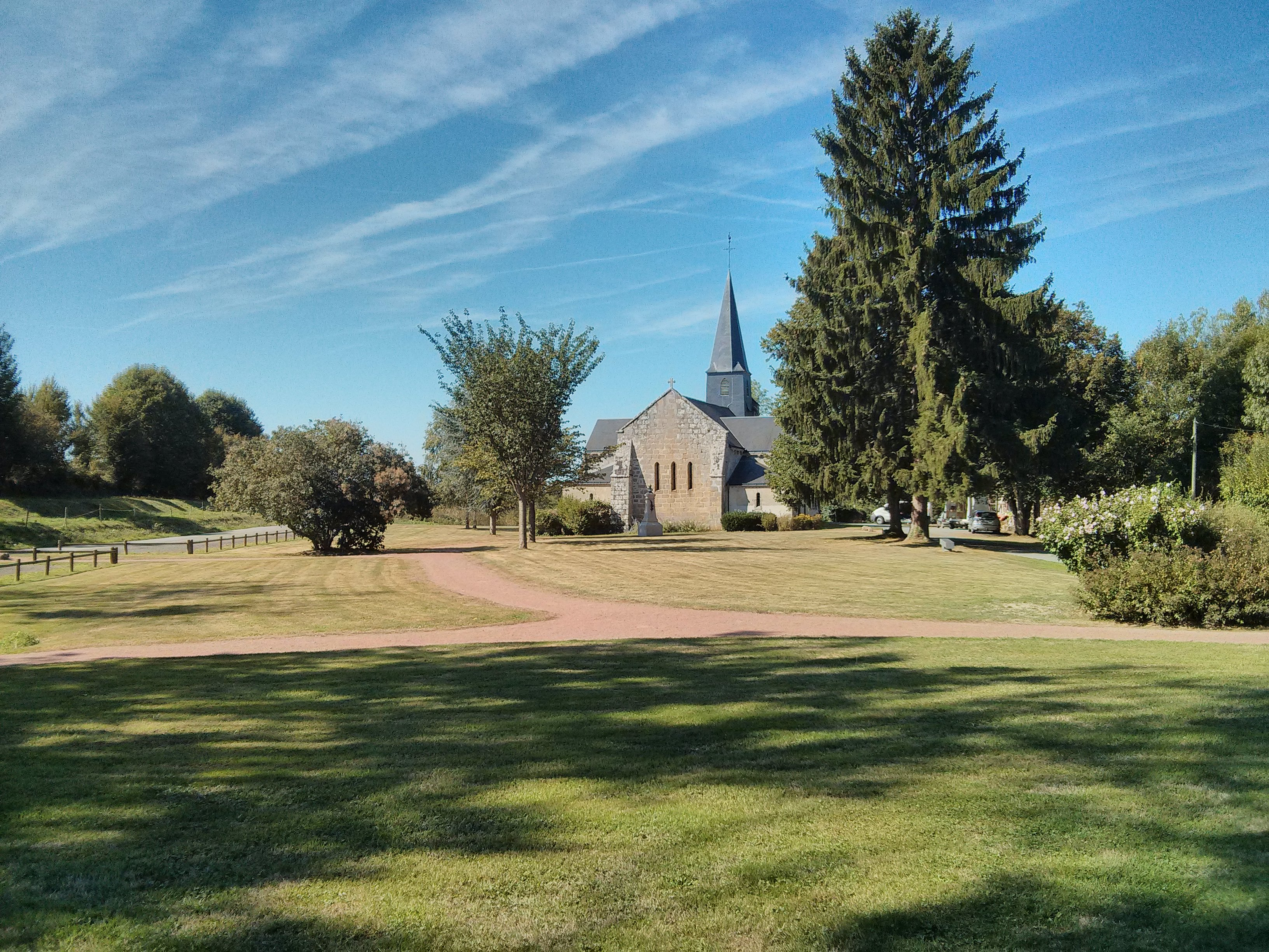 Panorama depuis la route de l'arrière de l'église du village de la Forêt-du-Temple, Creuse, Limousin, France. C'est l'ancienne chapelle de la commanderie templière.